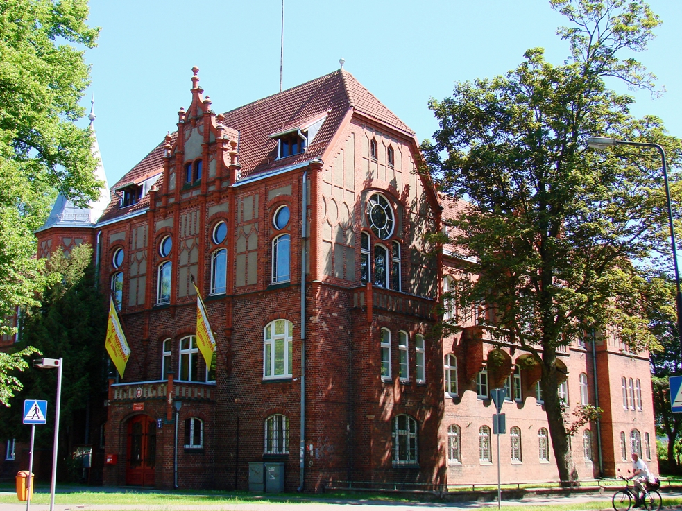 Szczecinek, ul. 3 Maja 2 - budynek dawnego urzędu powiatowego, obecnie szkoła muzyczna, 1905-1908